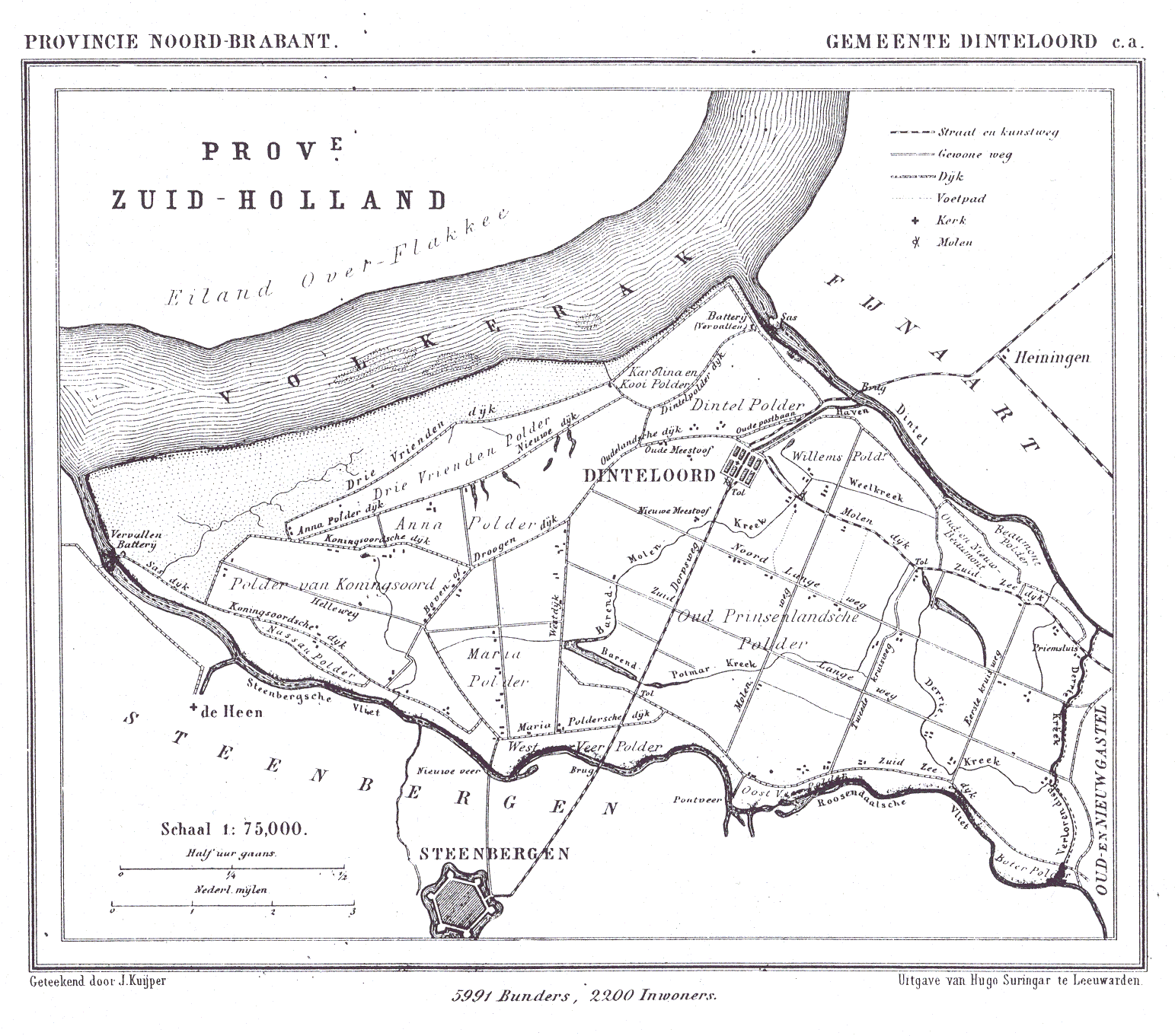 Nederland, Noord-Brabant, Gemeente Dinteloord